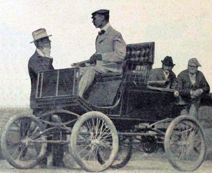 John Jacob Astor (NY) à une course américaine de voitures à vapeur (La Vie au Grand Air du 11 août 1901, p.462)